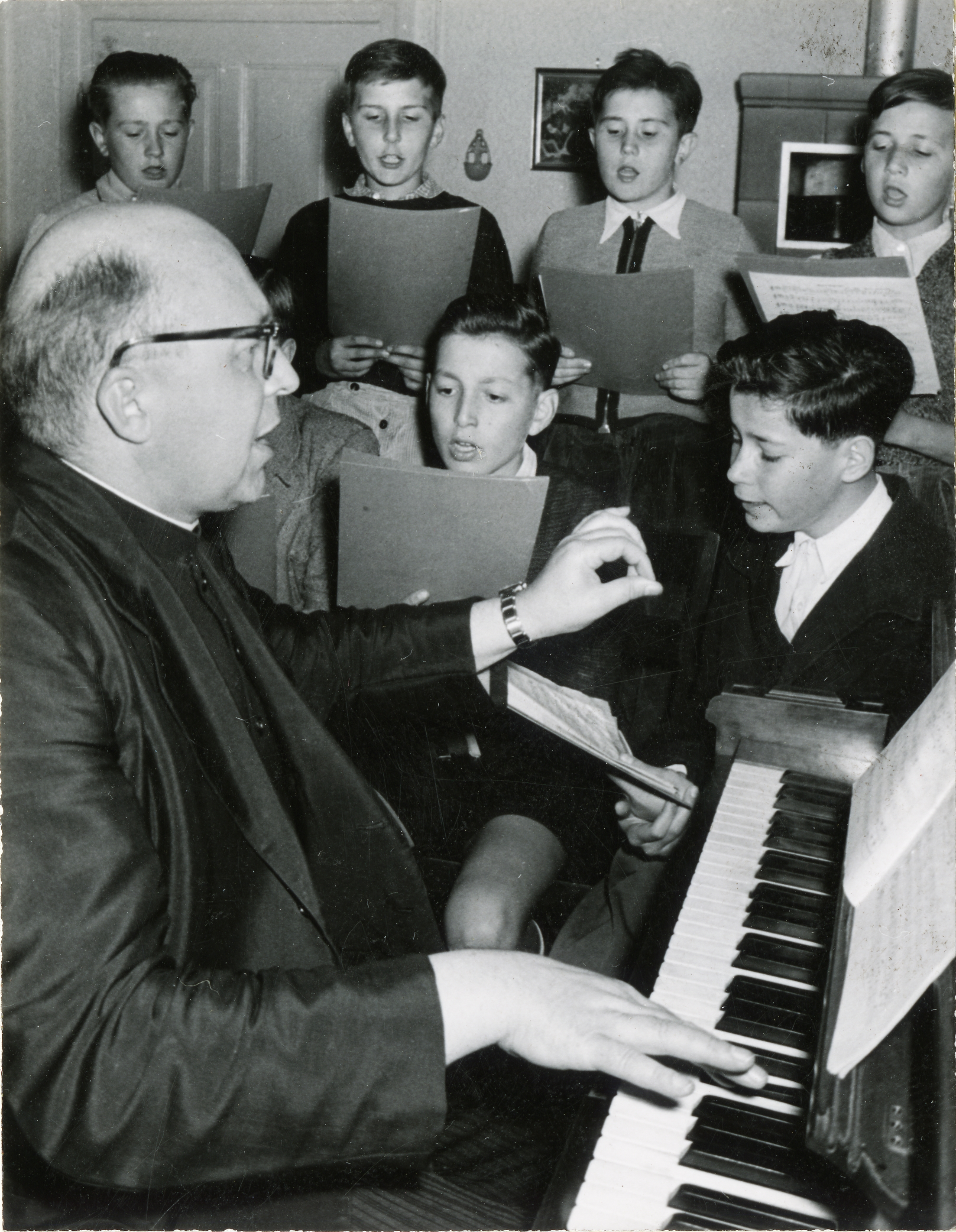 eigene Datei